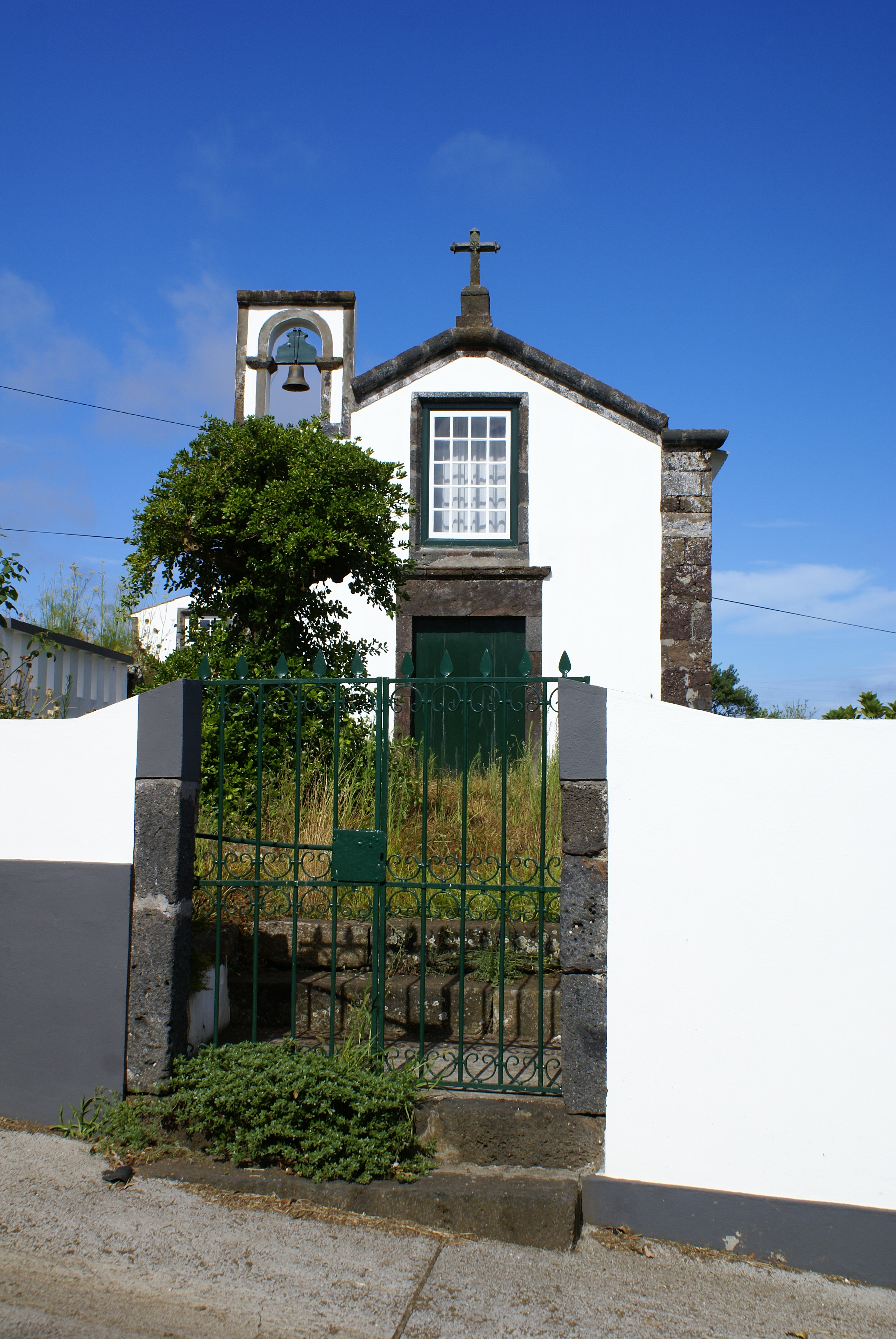 Ermida de Santo Amaro, Santa Cruz da Graciosa, ilha Graciosa, Açores, Portugal